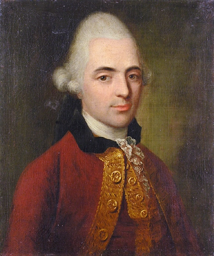 Bildnis des (späteren Lübecker Bürgermeisters) Johann Caspar Lindenberg